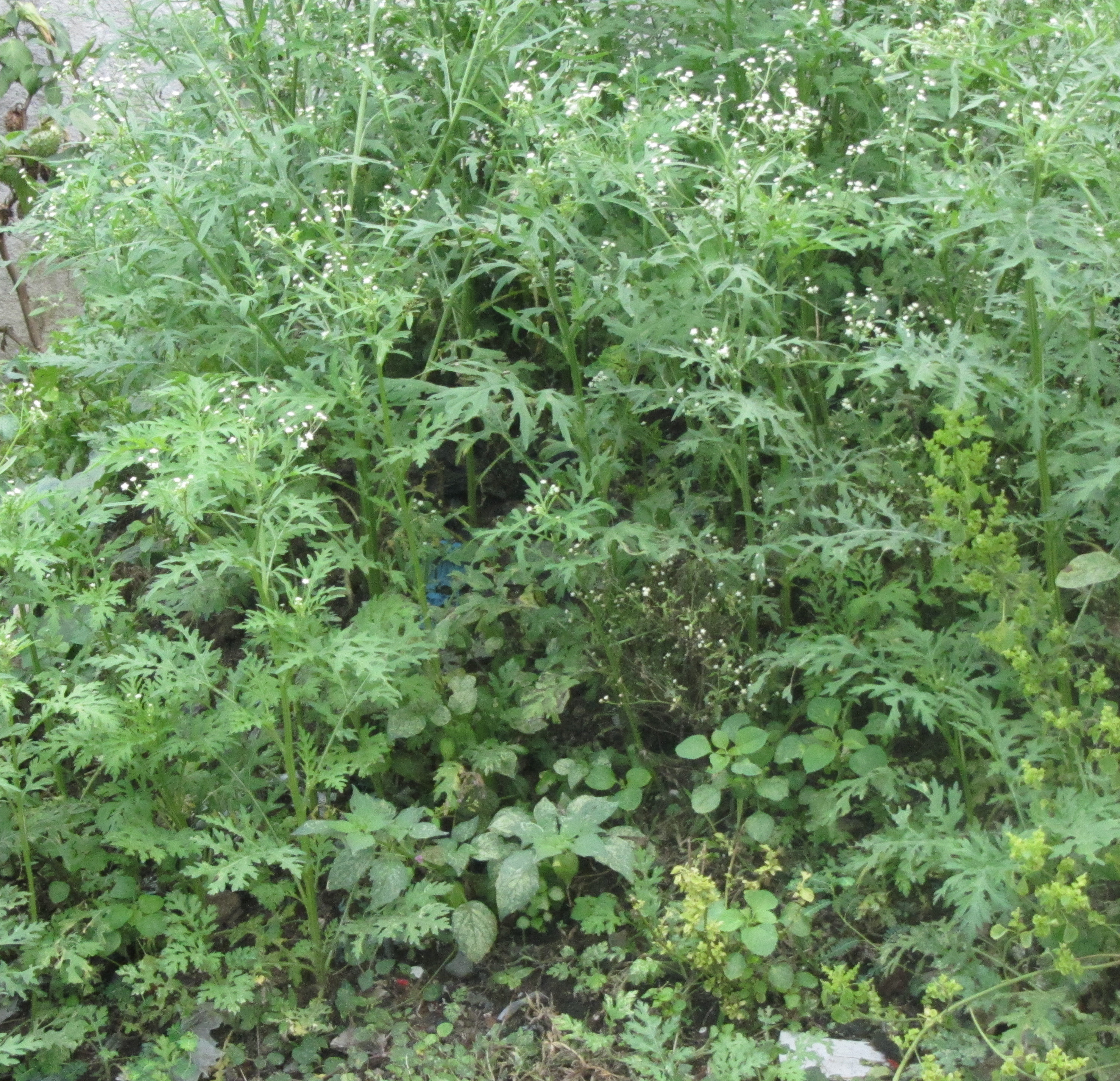 வெண்டாளி ஒருவகைக் காட்டுப்பூ. இடைச்சங்க காலத்தில் தோன்றிய நூல்களில் வெண்டாளி என்பது ஒருவகைப் பாவினம். இது இந்தப் பூவின் பெயரால் அமைந்தது.